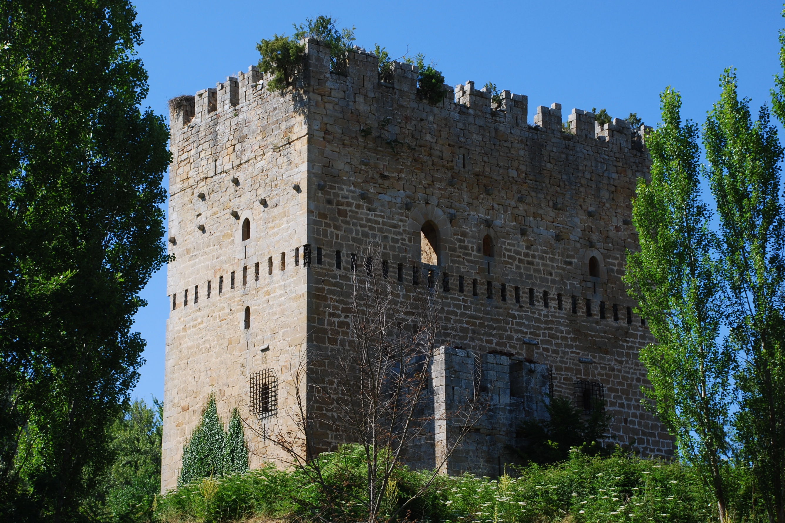 Torre de los Velasco en Espinosa de los Monteros, provincia de Burgos (España).